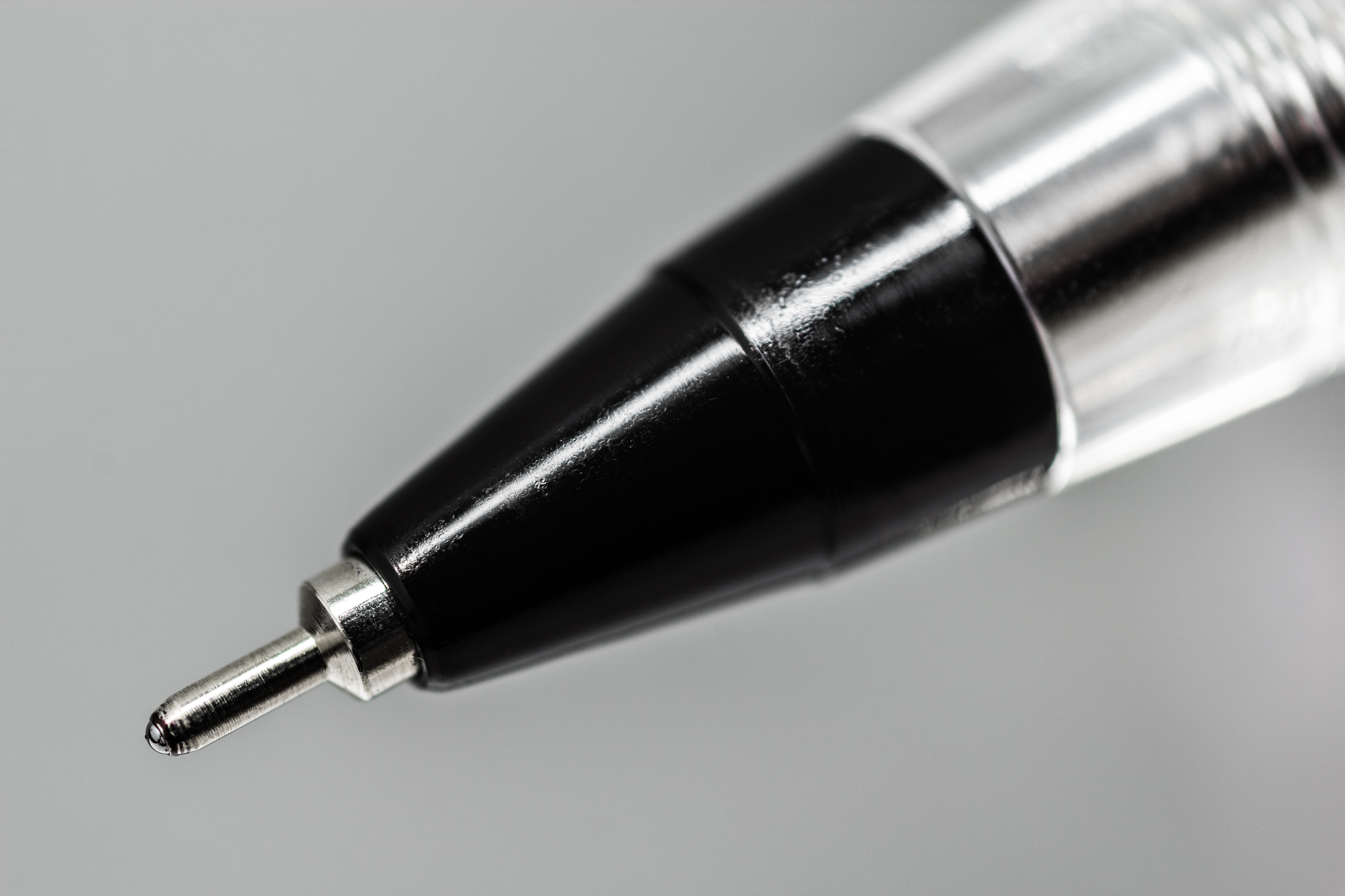 NO.600NP黒 [ニードルポイント事務用]